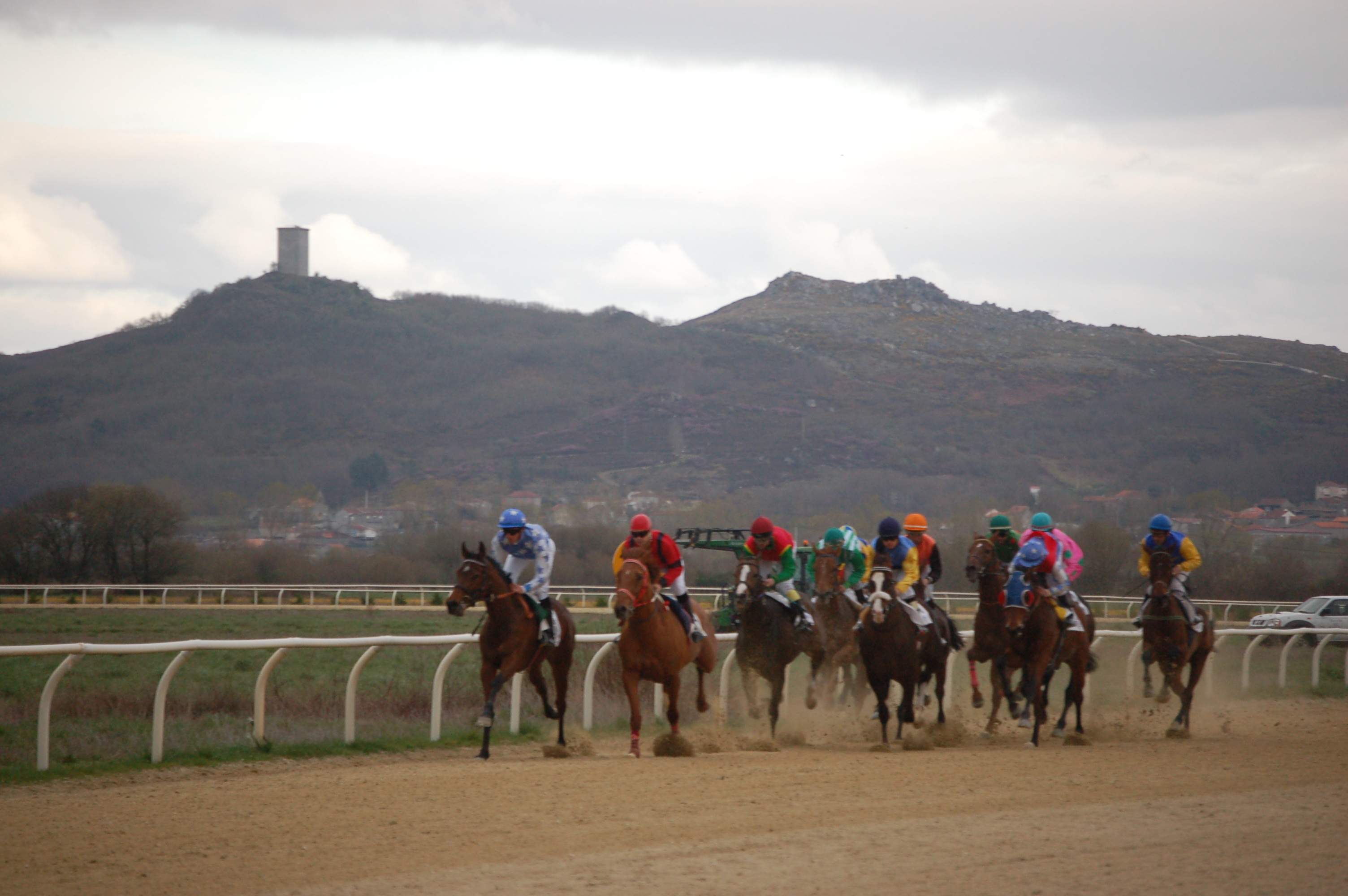 Carreira no hipódromo de Antela, coa Torre da Pena da Portela ao fondo